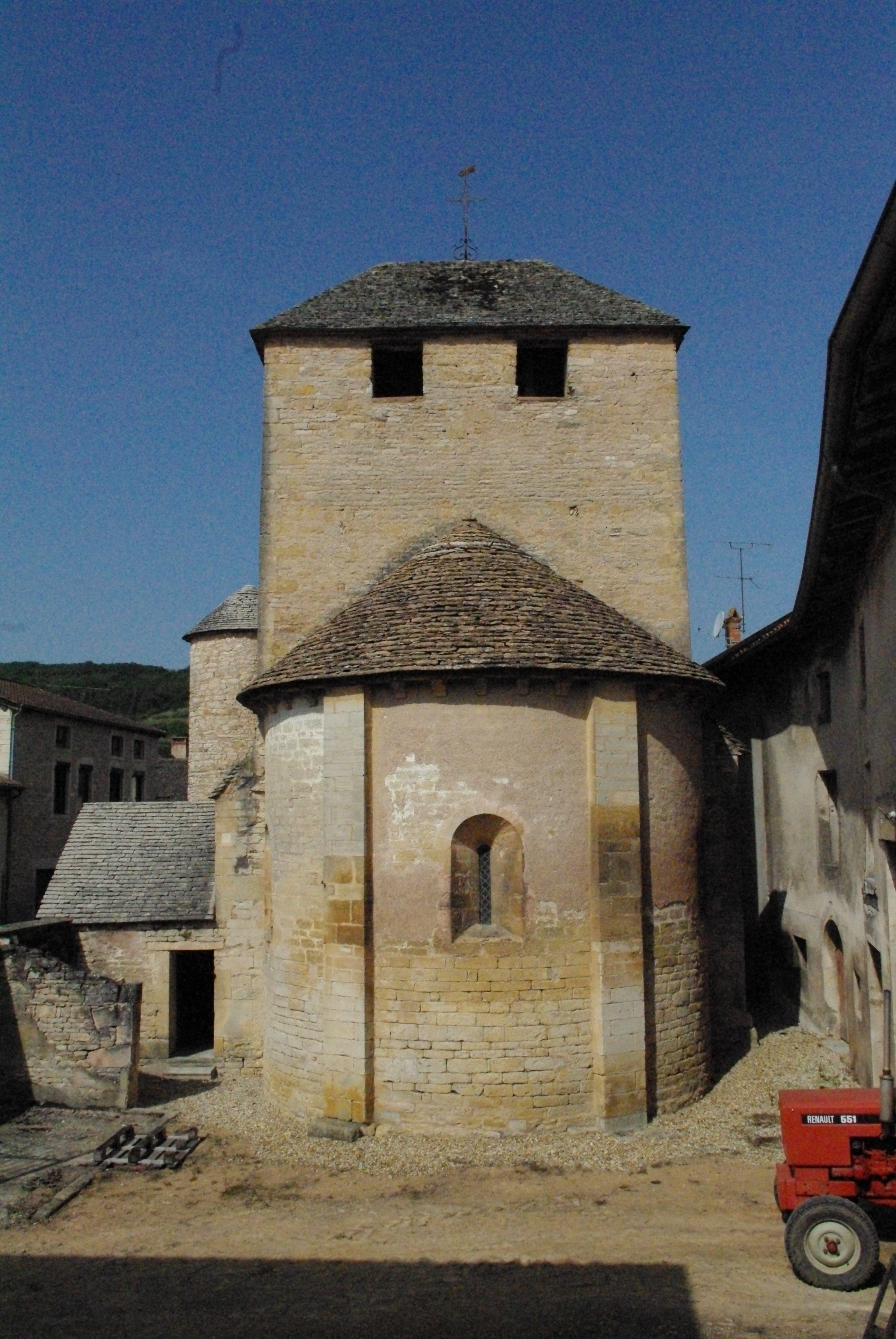 Vue du cul de four de l'Église de Bissy-la-Mâconnaise